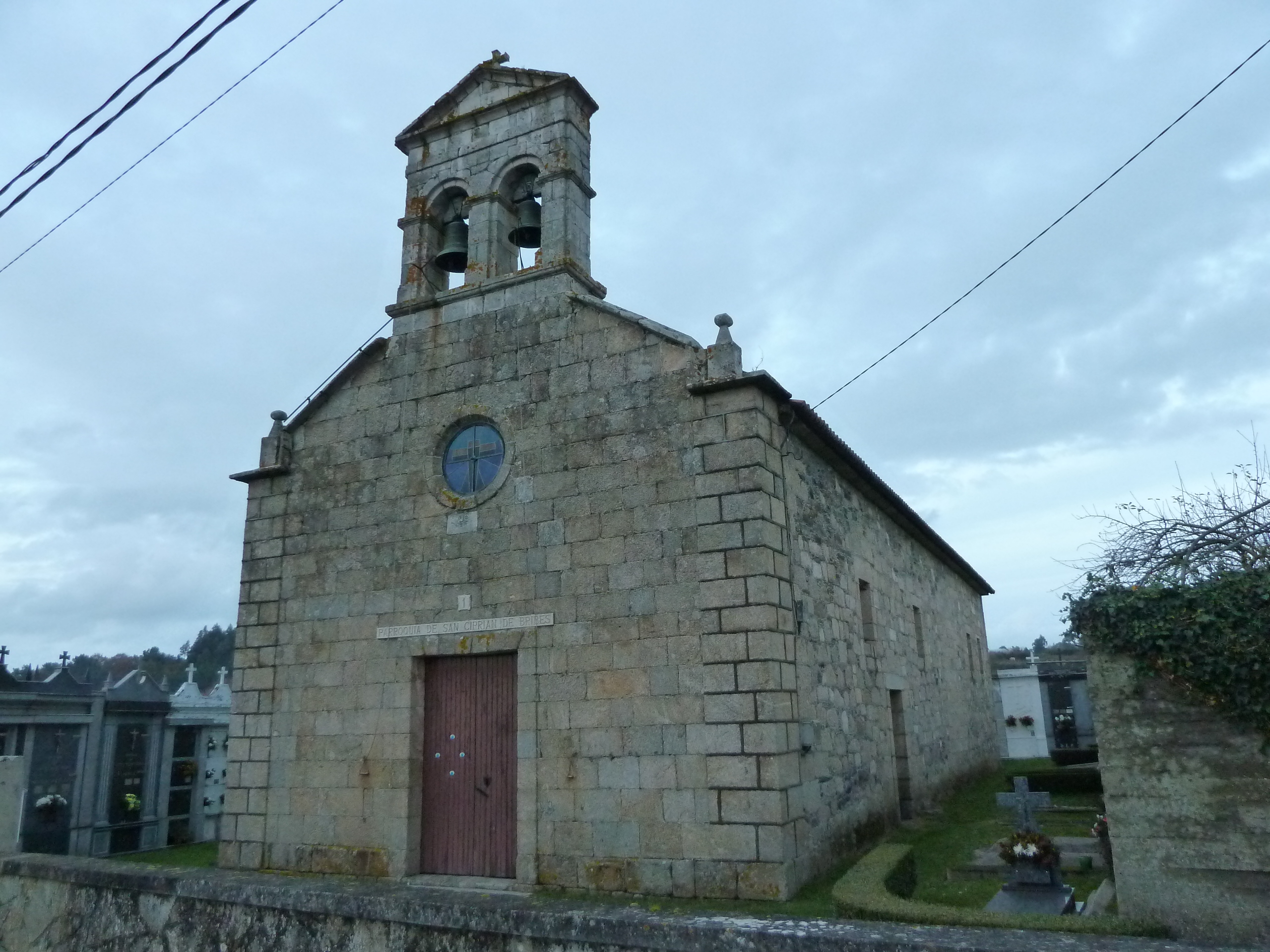 Igrexa parroquial de San Ciprián de Bribes, Cambre, Coruña.